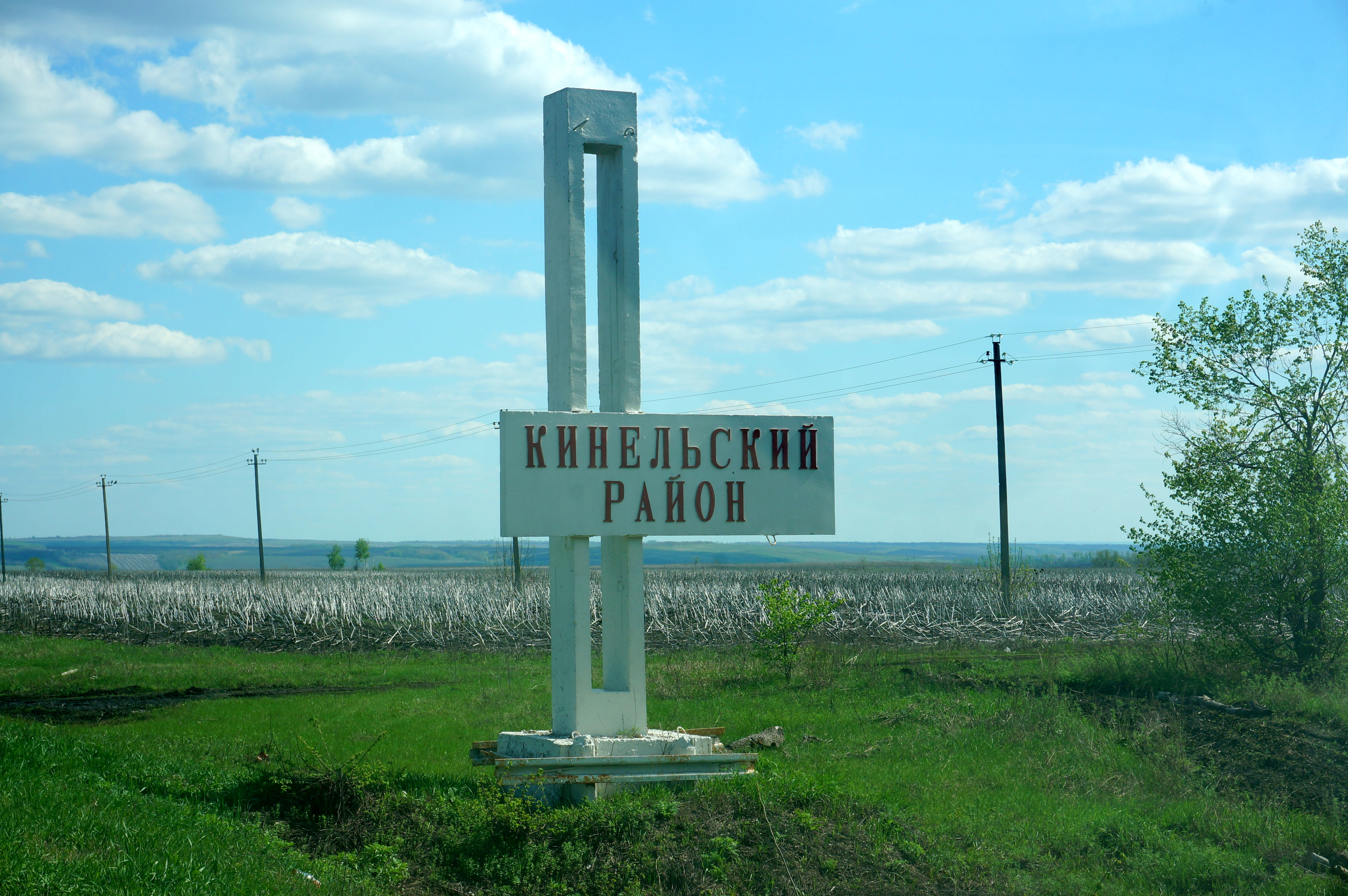 Указатель въезда в Кинельский район Самарской области, Россия